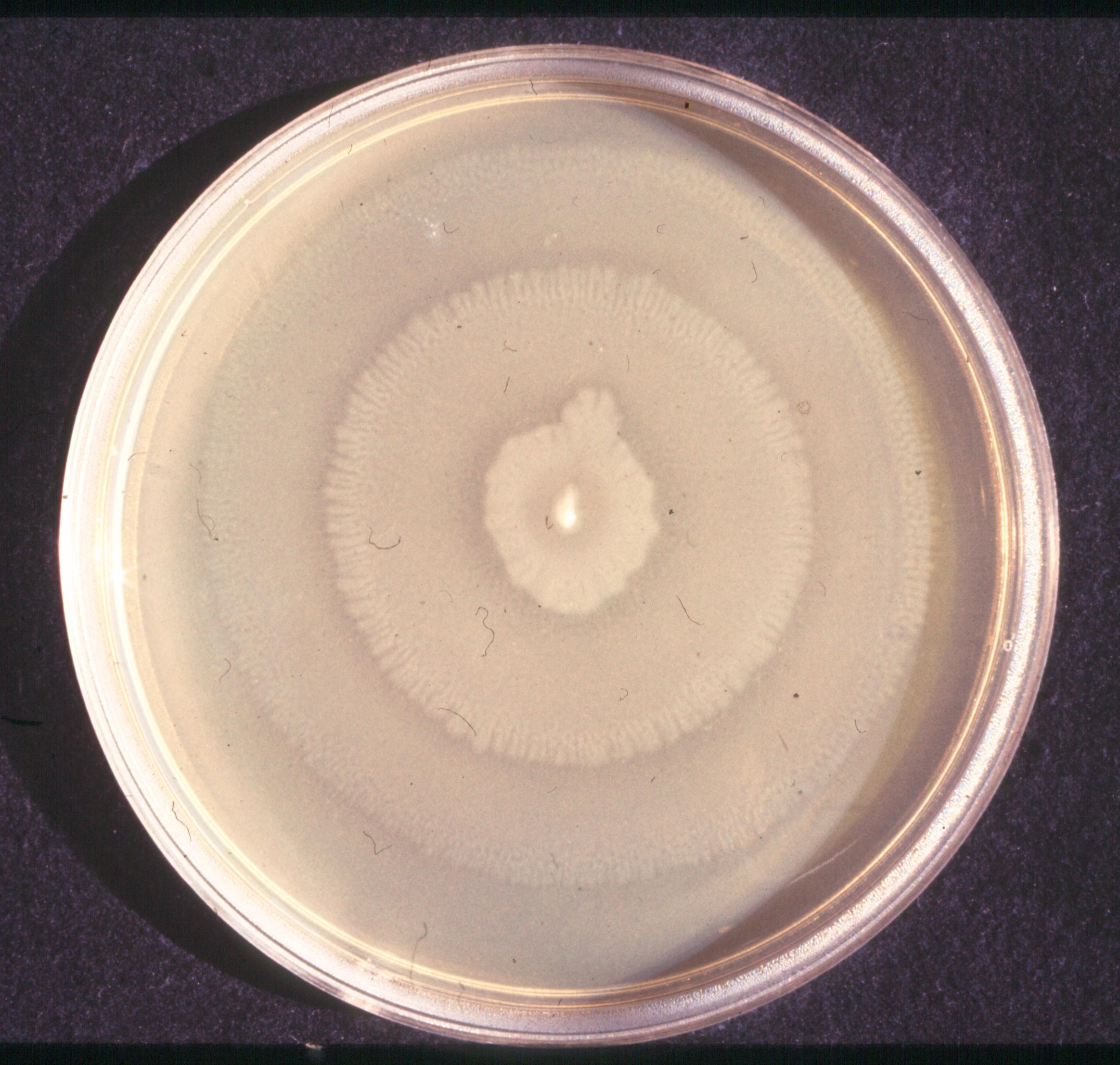 Proteus mirabilis, Kolonie auf Agargel-Nährboden. Die Agargelplatte wurde in der Mitte beimpft, während der Inkubation breitete sich die entstehende Kolonie durch Schwärmen auf der gesamten Oberfläche des Agargels aus.